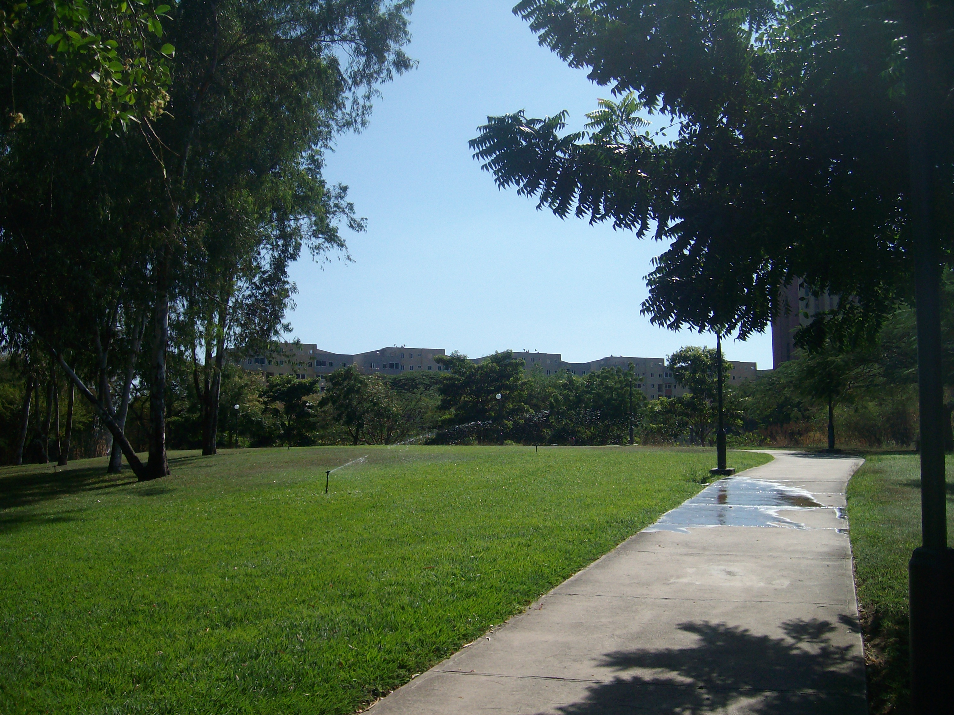 Urbanización Industrial Carabobo